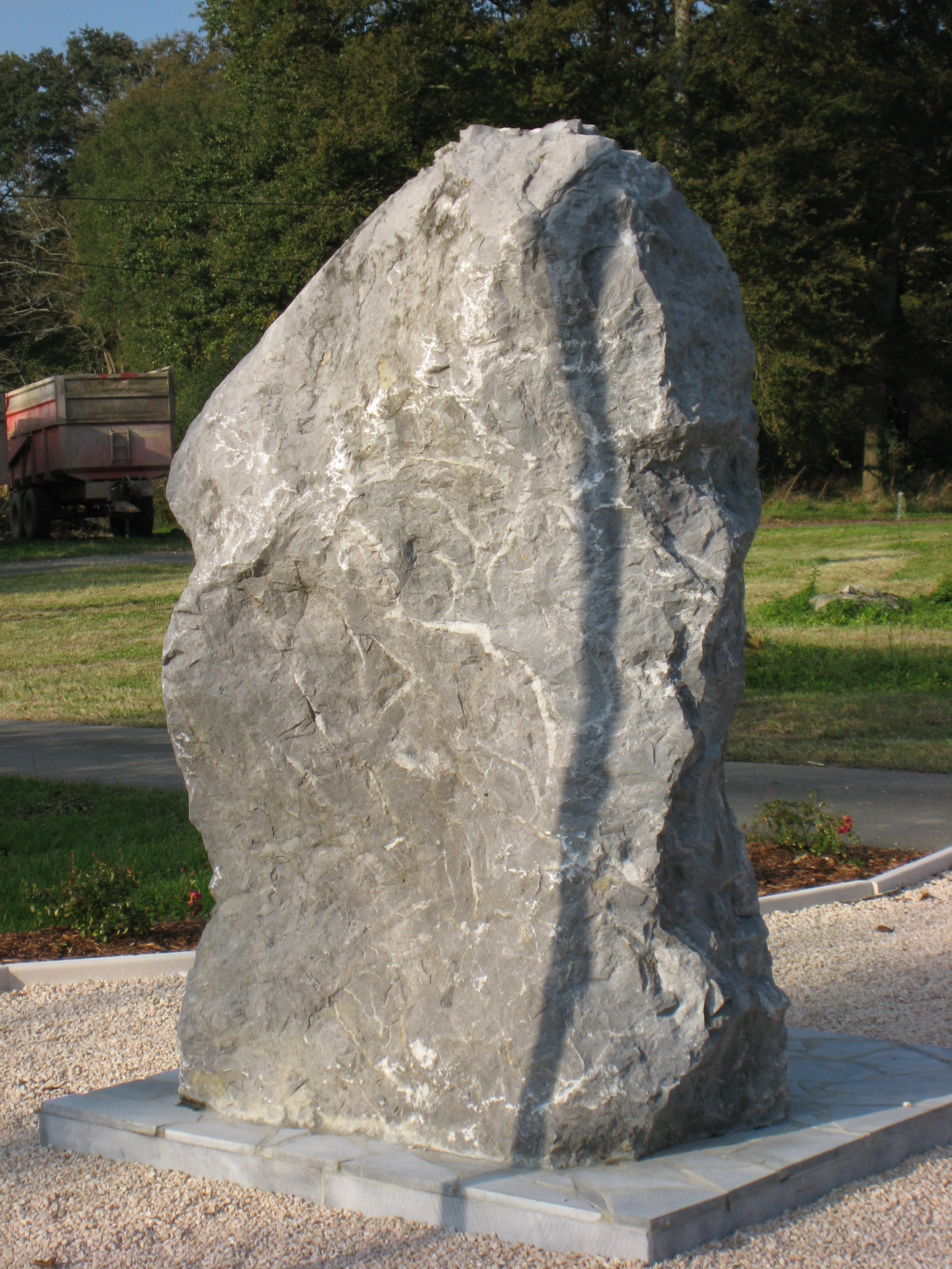 Monument aus morts de Poey-d'Oloron (Pyrénées Atlantiques) Pyrénées).